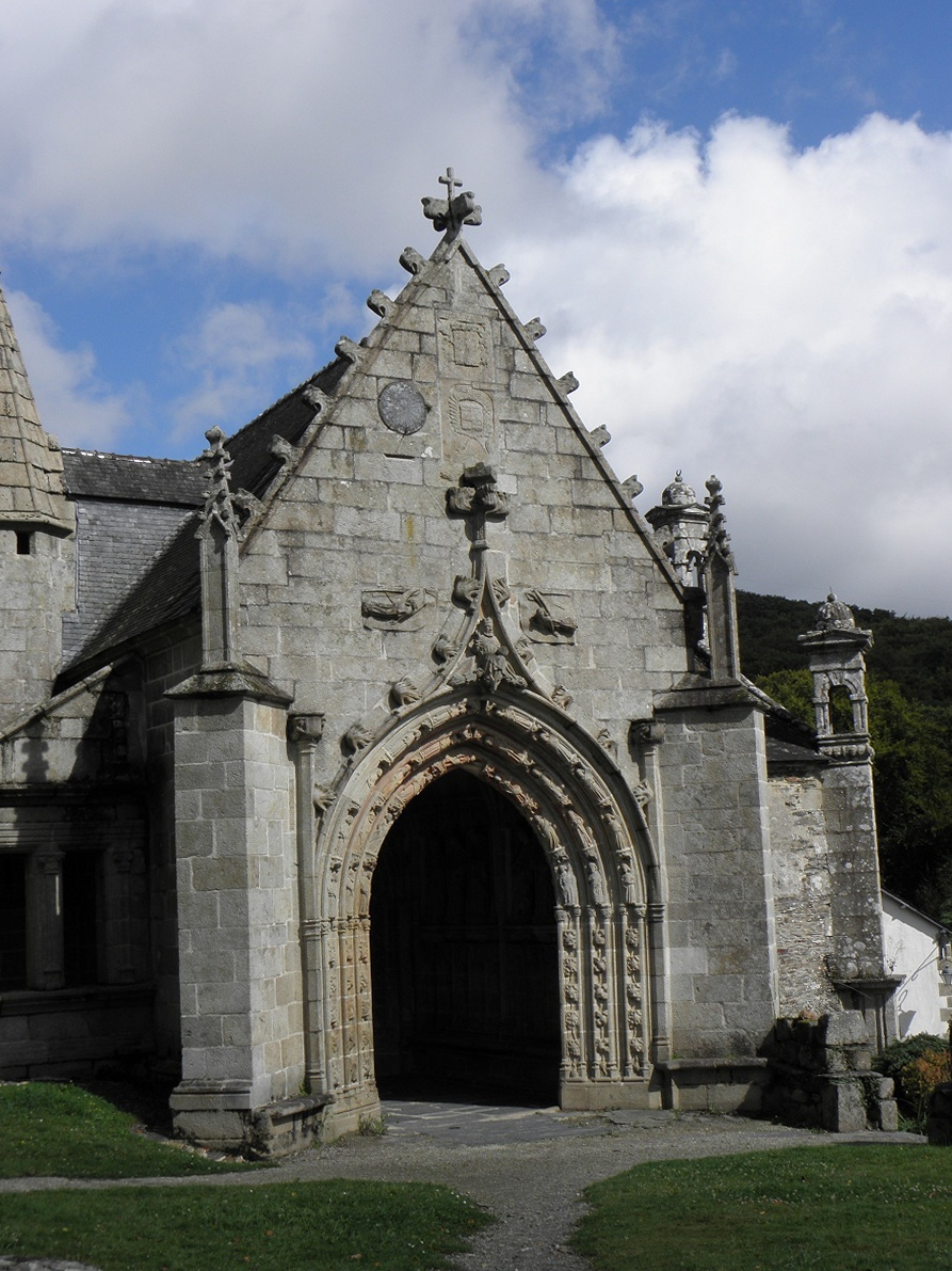 Porche méridional de la chapelle de Saint-Herbot (29). .